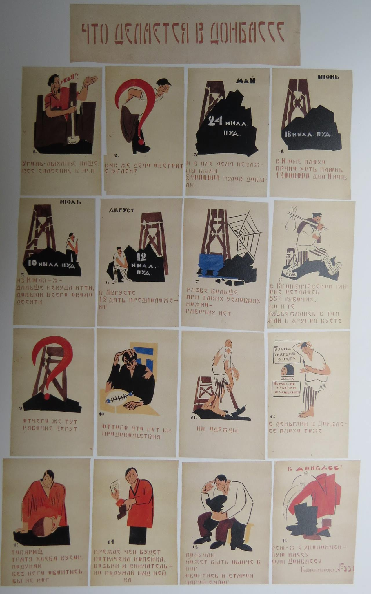 Окно Главполитпросвета № 331